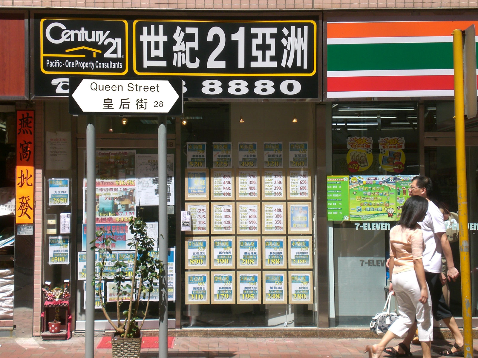 中文（香港）: 西環皇后街世紀21物業代理商